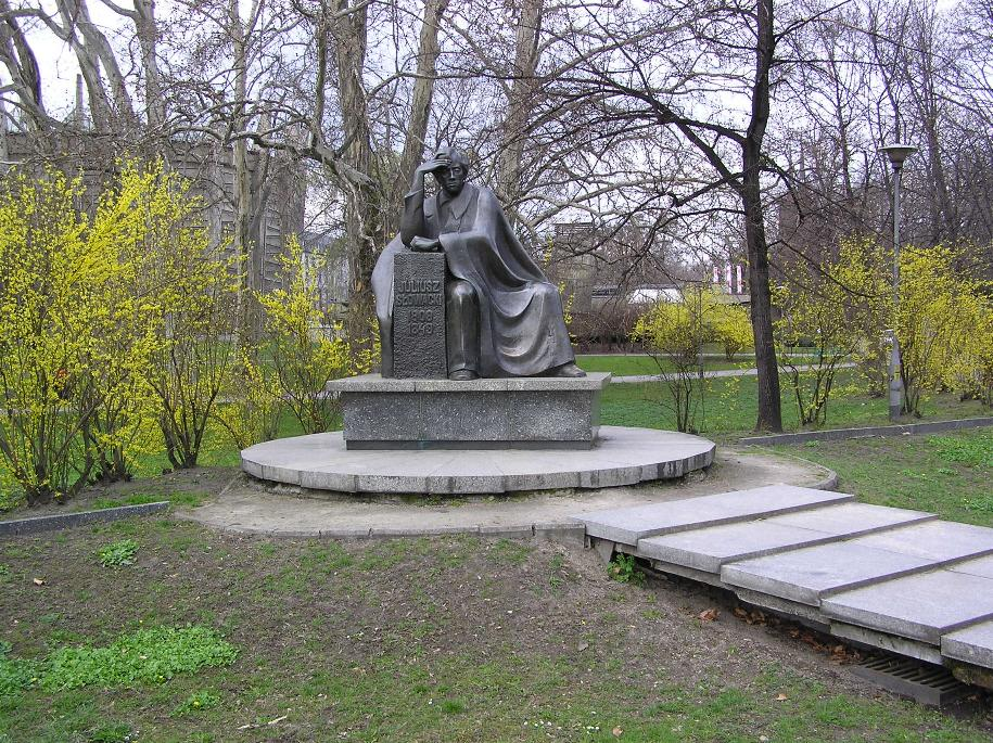 Pomnik Juliusza Słowackiego, Juliusz Słowacki Denkmal, Juliusz Słowacki monument